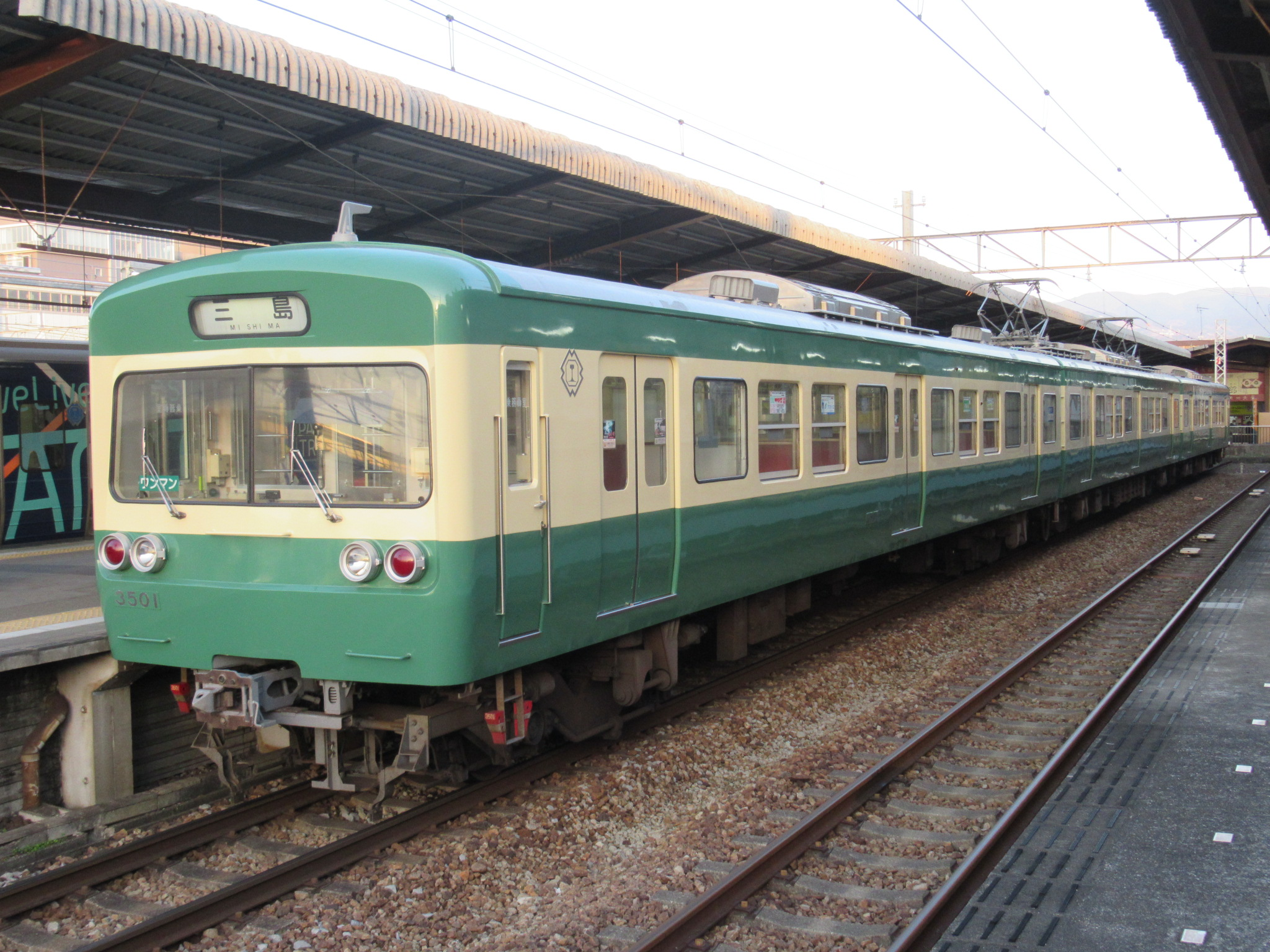 伊豆箱根鉄道3501 軌道線カラー